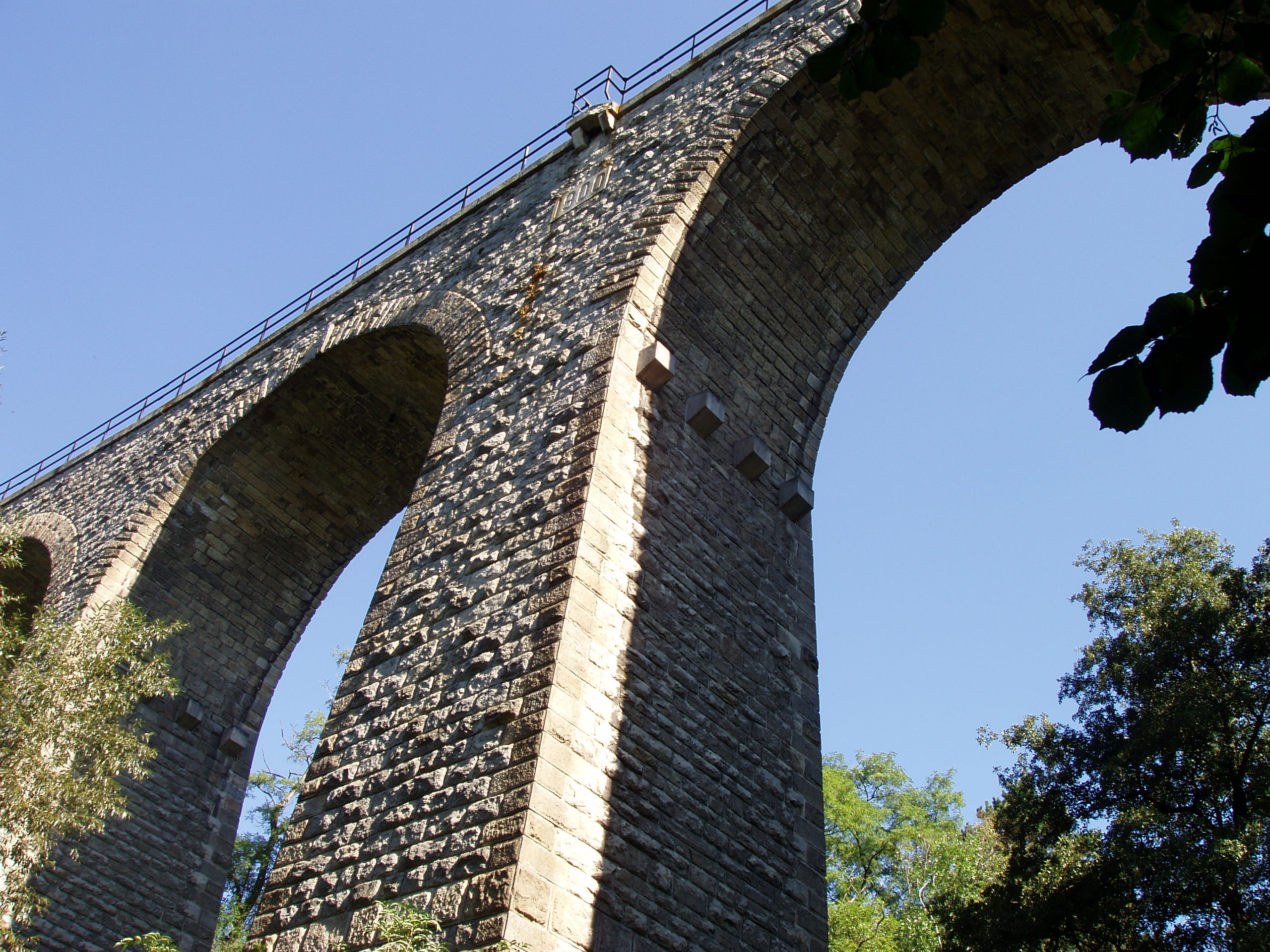 Železniční most mezi stanicemi Červené Pečky a Ratboř, přes údolí Chotouchovského potoka, Bohouňovice I